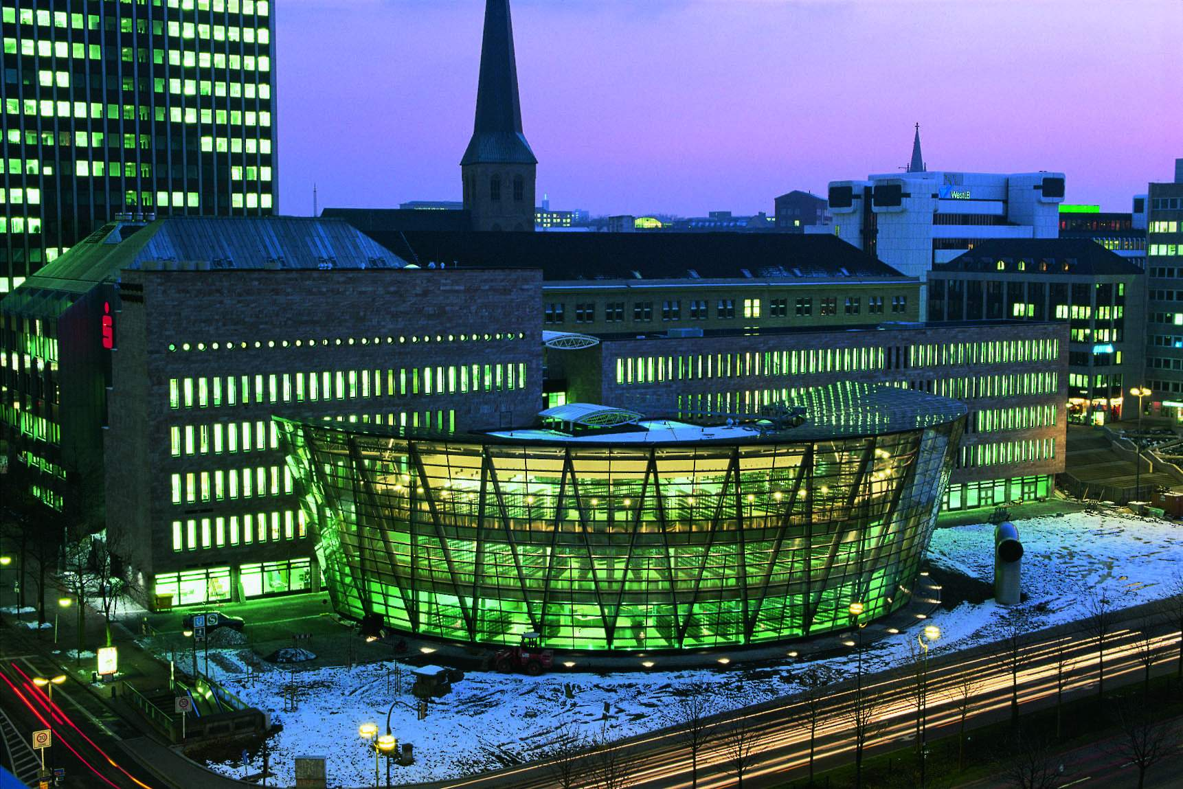 Zentralbibliothek der Stadt- und Landesbibliothek Dortmund. Abendansicht.